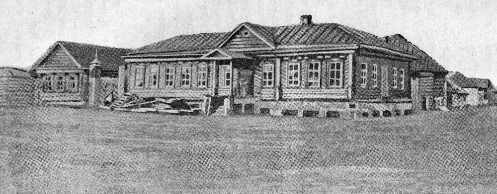 Maison du peuple dans le bourg de Tsarevchtchina - Lieu ou se son déroulés les évènements révolutionnaires de 1905.